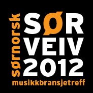 Sørveiv Logo